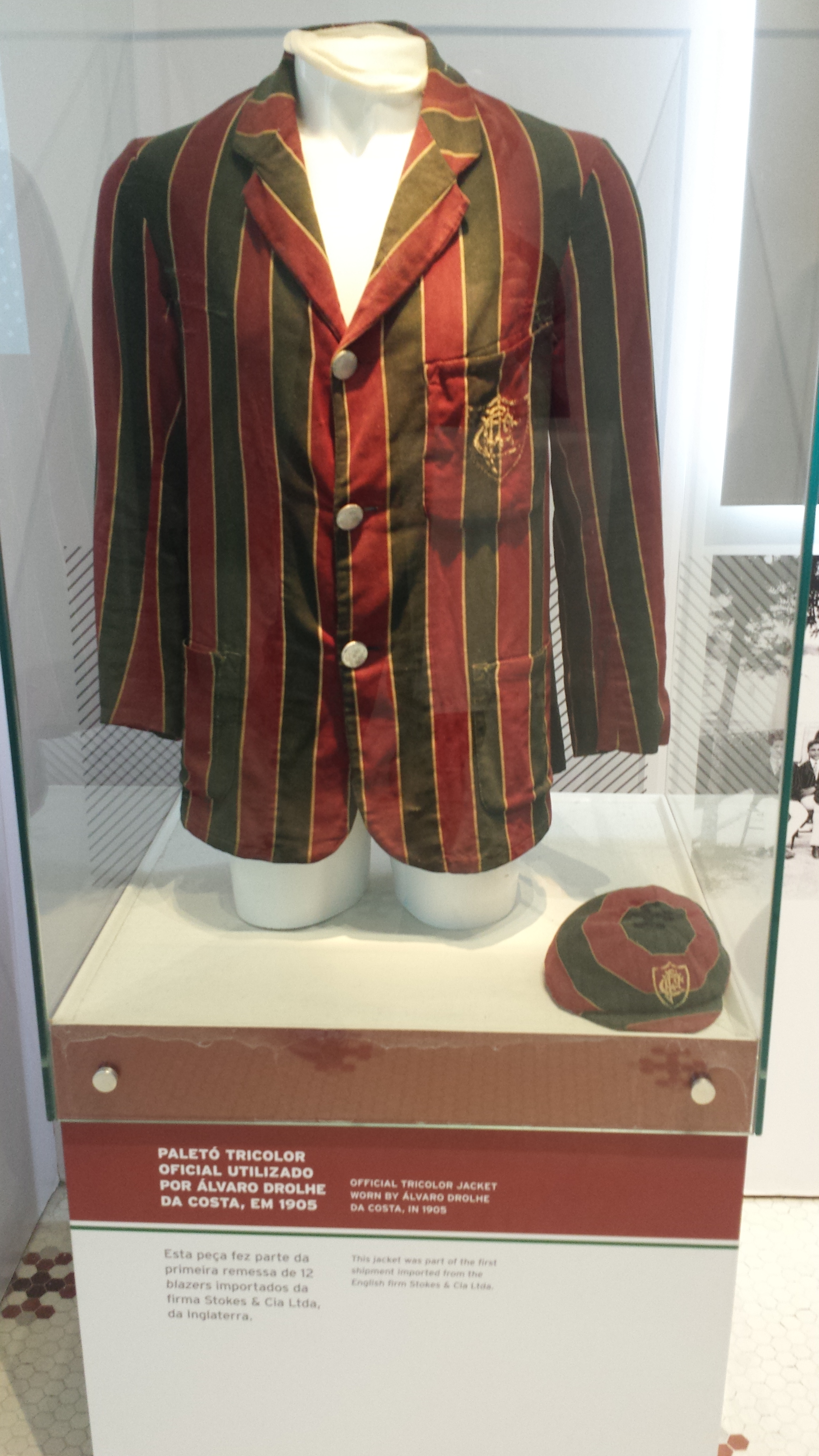 Uniforme utilizado pelo Fluminense Football Club no ano de 1905 em exposição na Sala de Troféus do clube.